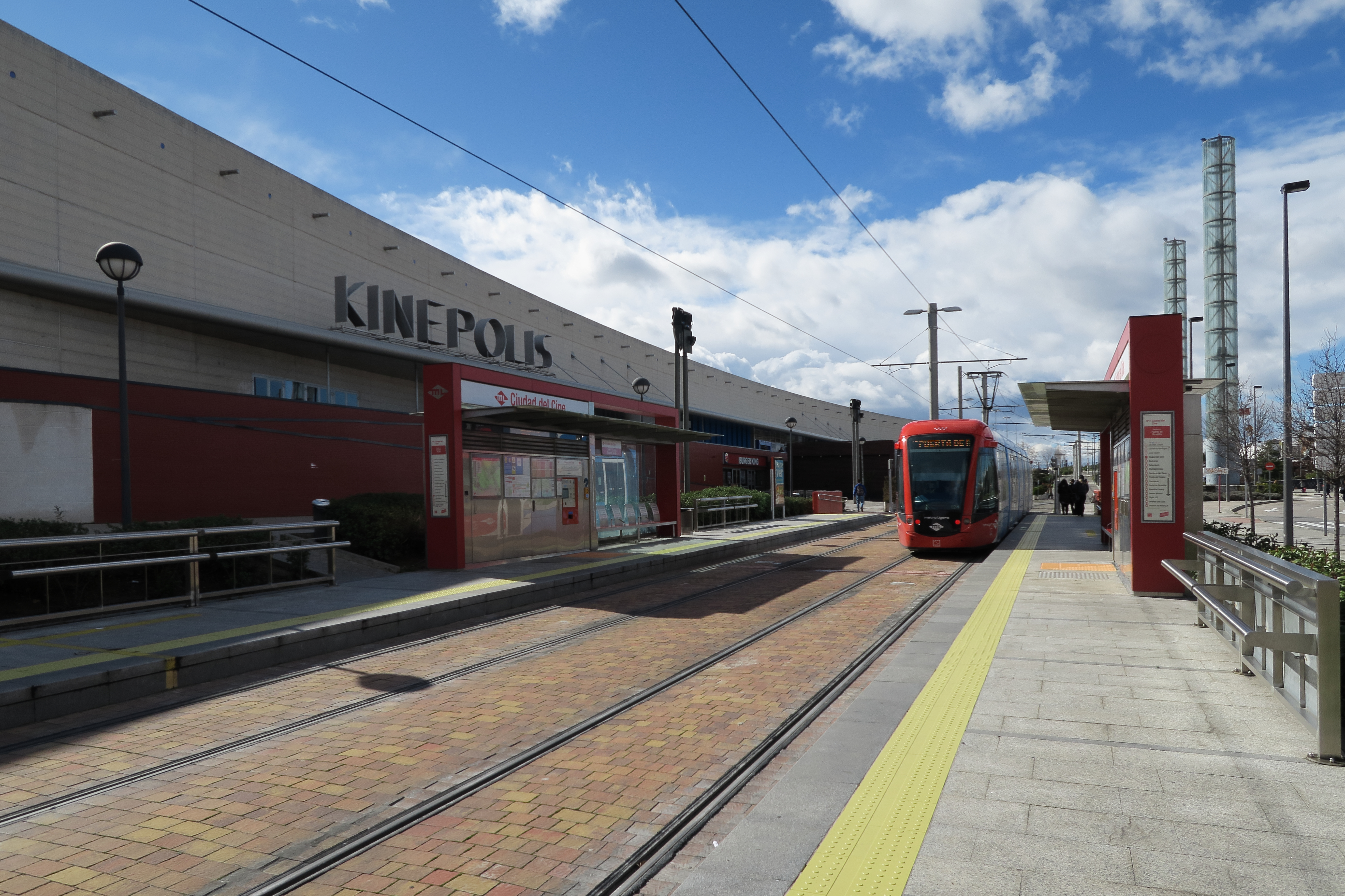 Estación de Ciudad del Cine